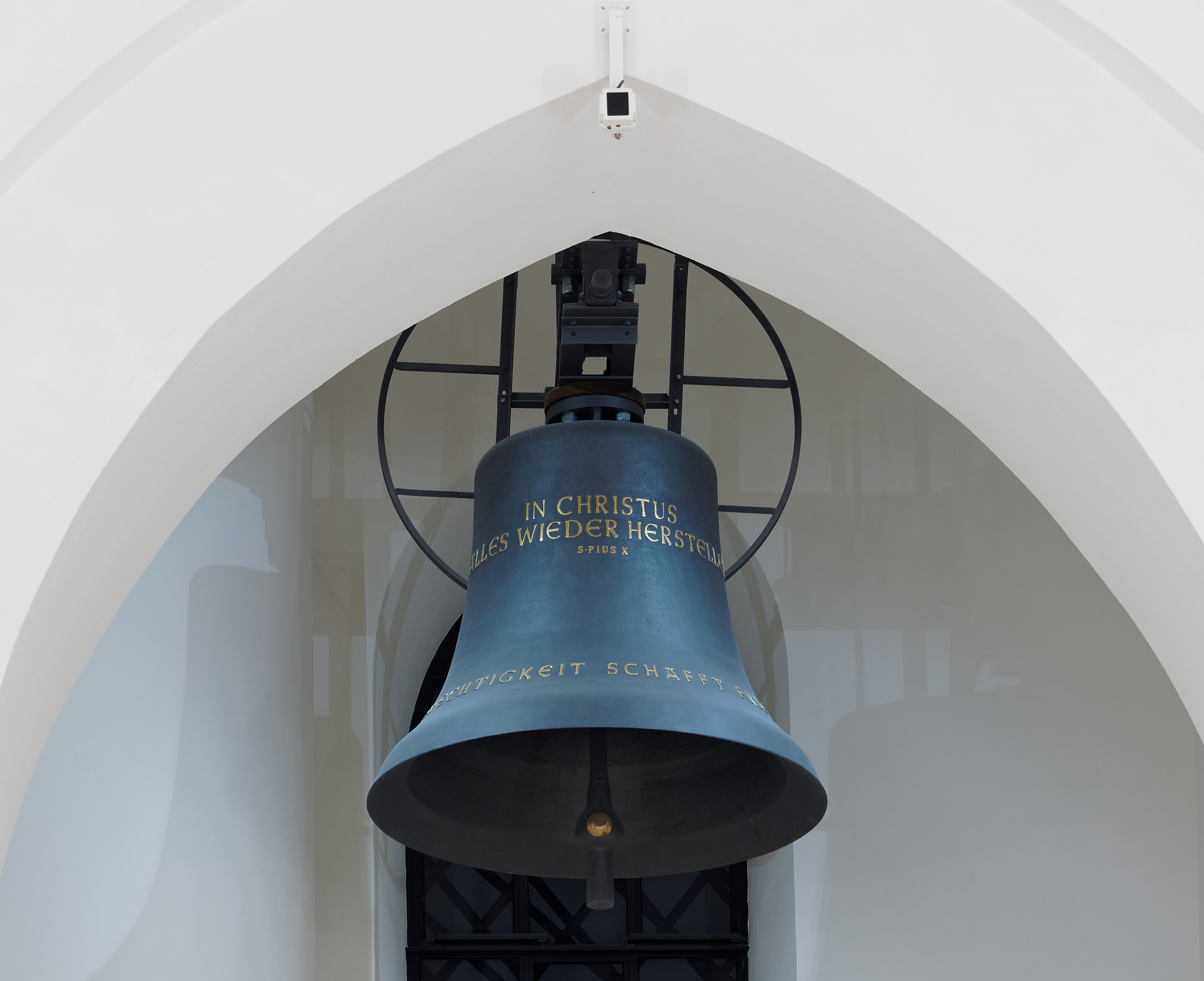 Anneliese Brost Musikforum Ruhr in Bochum, Innenansicht, die aus dem Turm in das Foyer umgehängte Glocke, Foto anläßlich der Einweihungsfeierlichkeiten